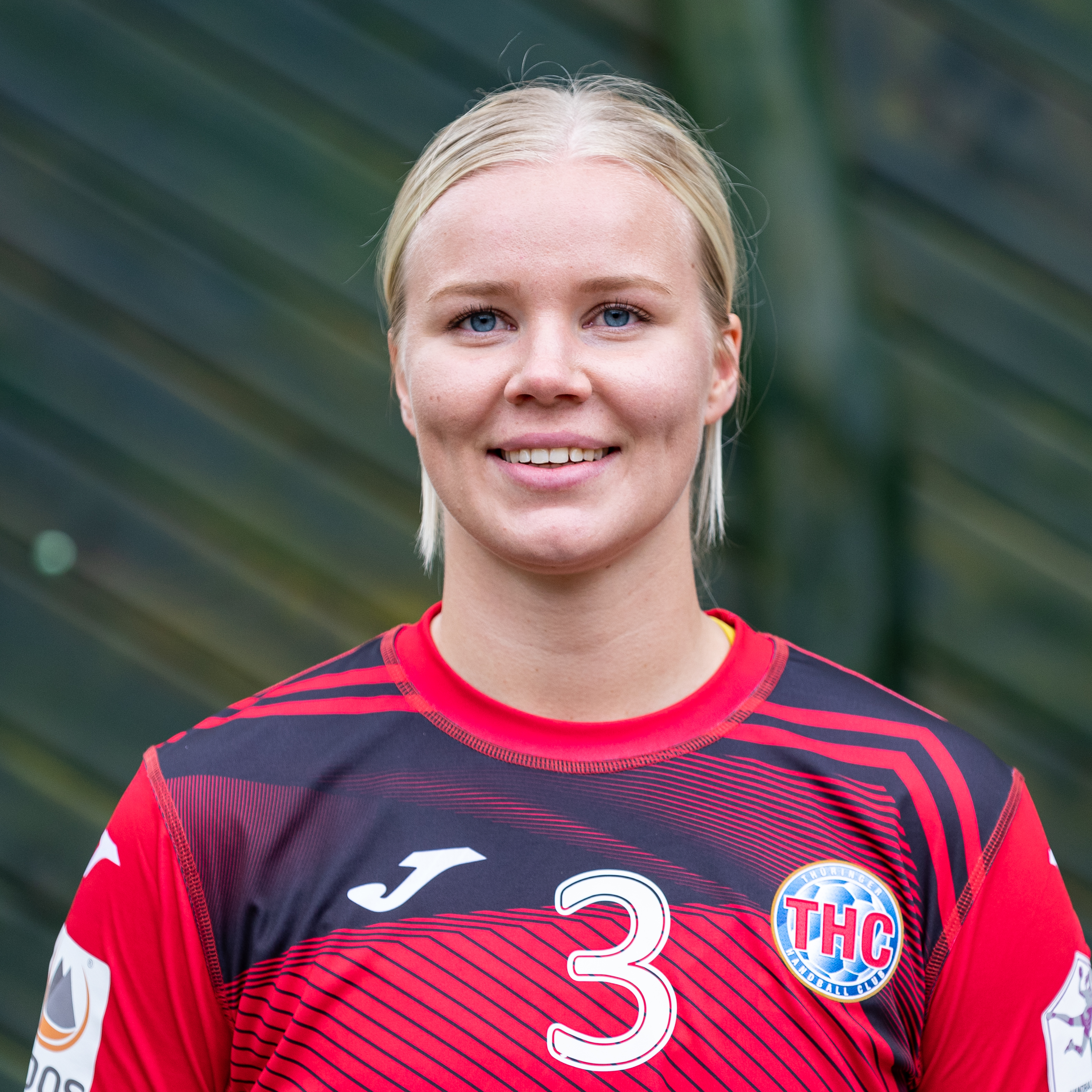 Handball, 1. Bundesliga Frauen, Thüringer HC, Teamfotos; Emma Ekenman-Fernis (Thüringer HC, 3); Porträt, Einzelbild